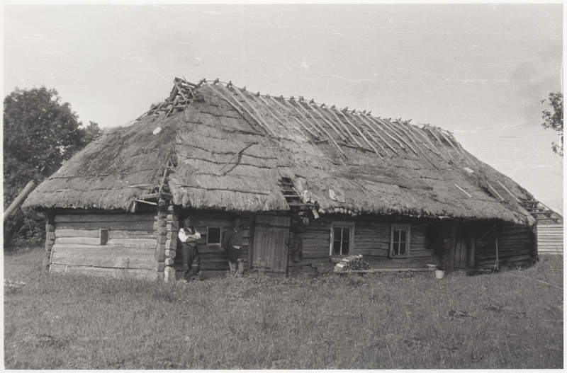 Ipp talu - viimane suitsutare Pakri saartel. Väike-Pakri, Suurküla.